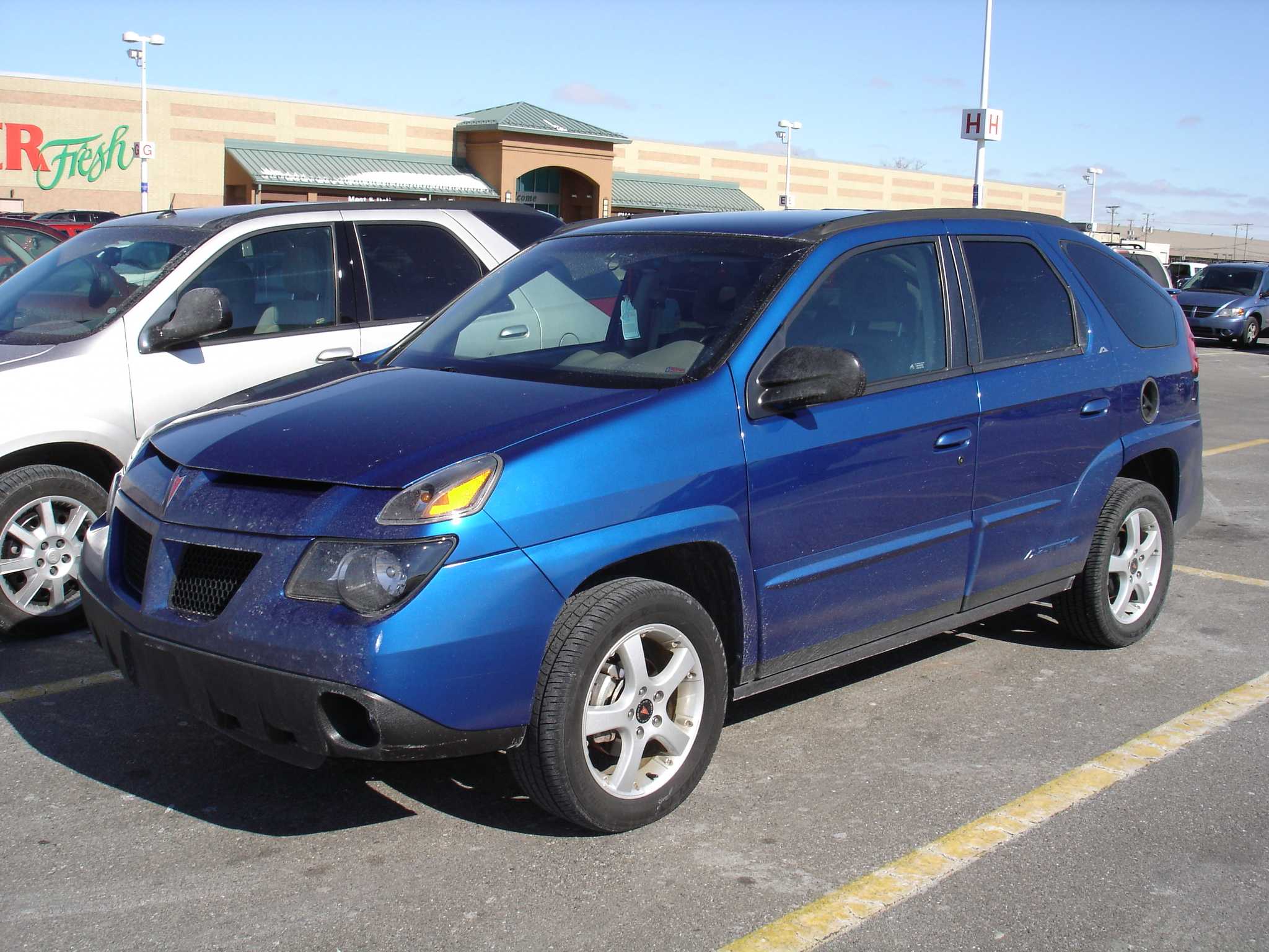 2004 Pontiac Aztek